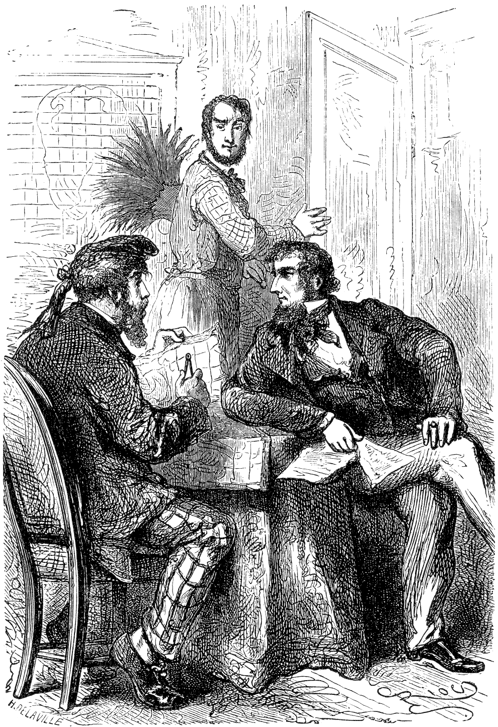 Jules Verne : Cinq Semaines en ballon, Hetzel & Cie, Paris, 1863.